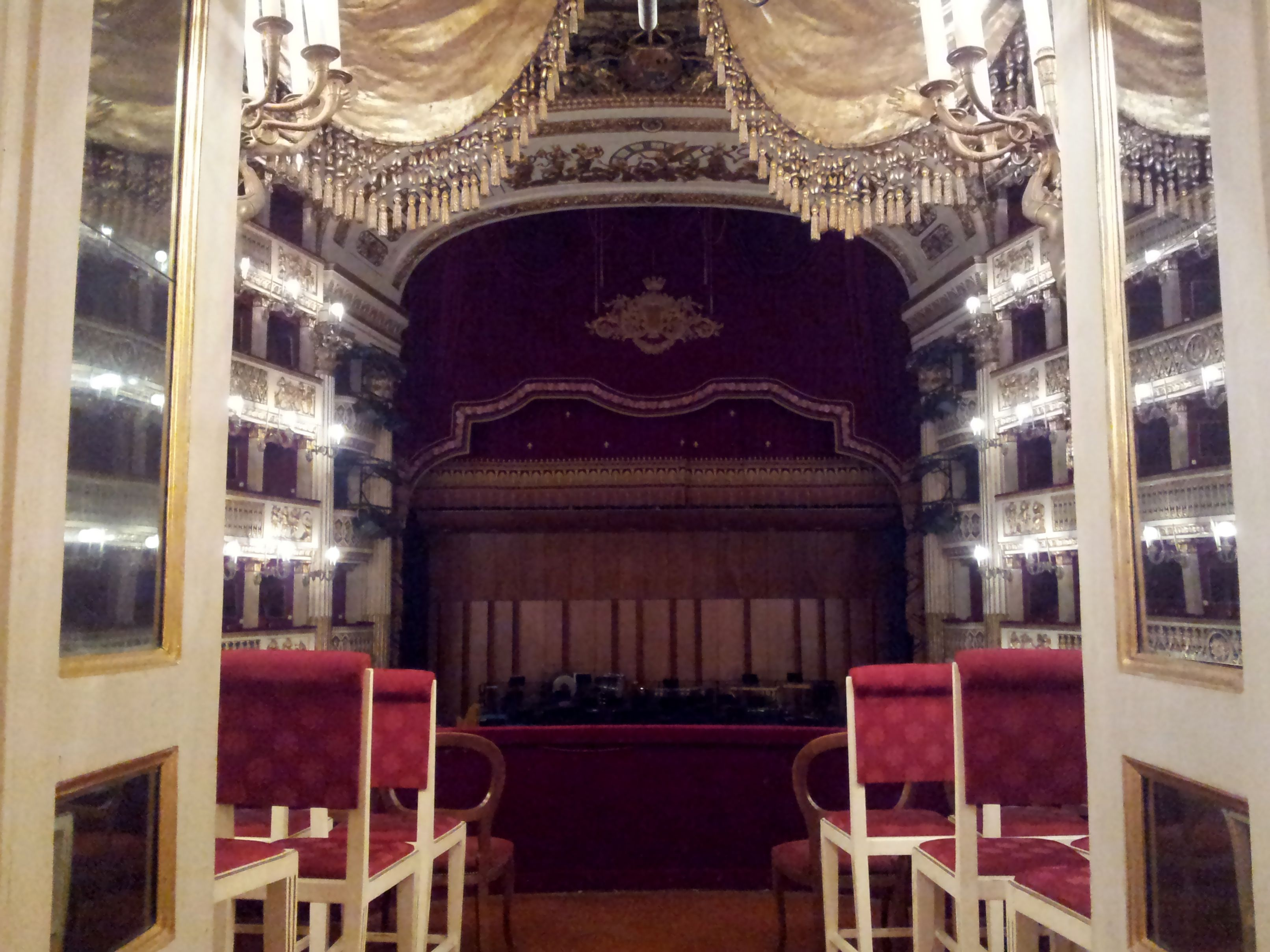 Scorcio dell'interno del Real Teatro di San Carlo di Napoli dal palco reale.